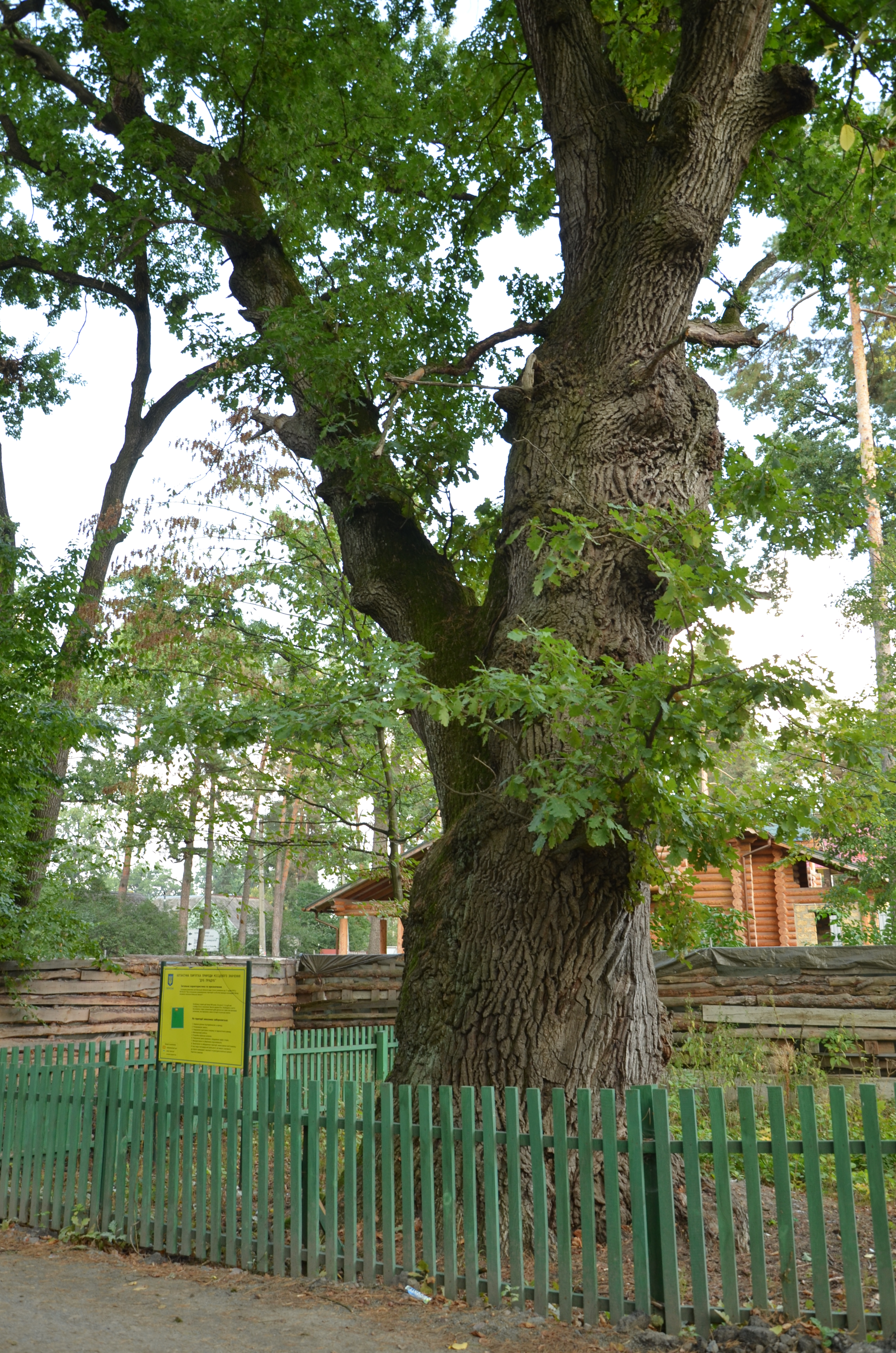 м. Ірпінь, вул. Мечнікова.